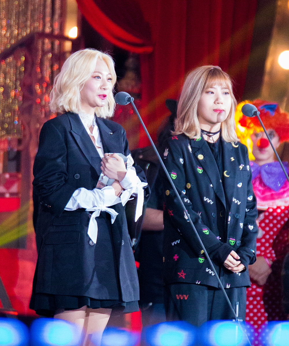 20161119 볼빨간사춘기 멜론뮤직어워드